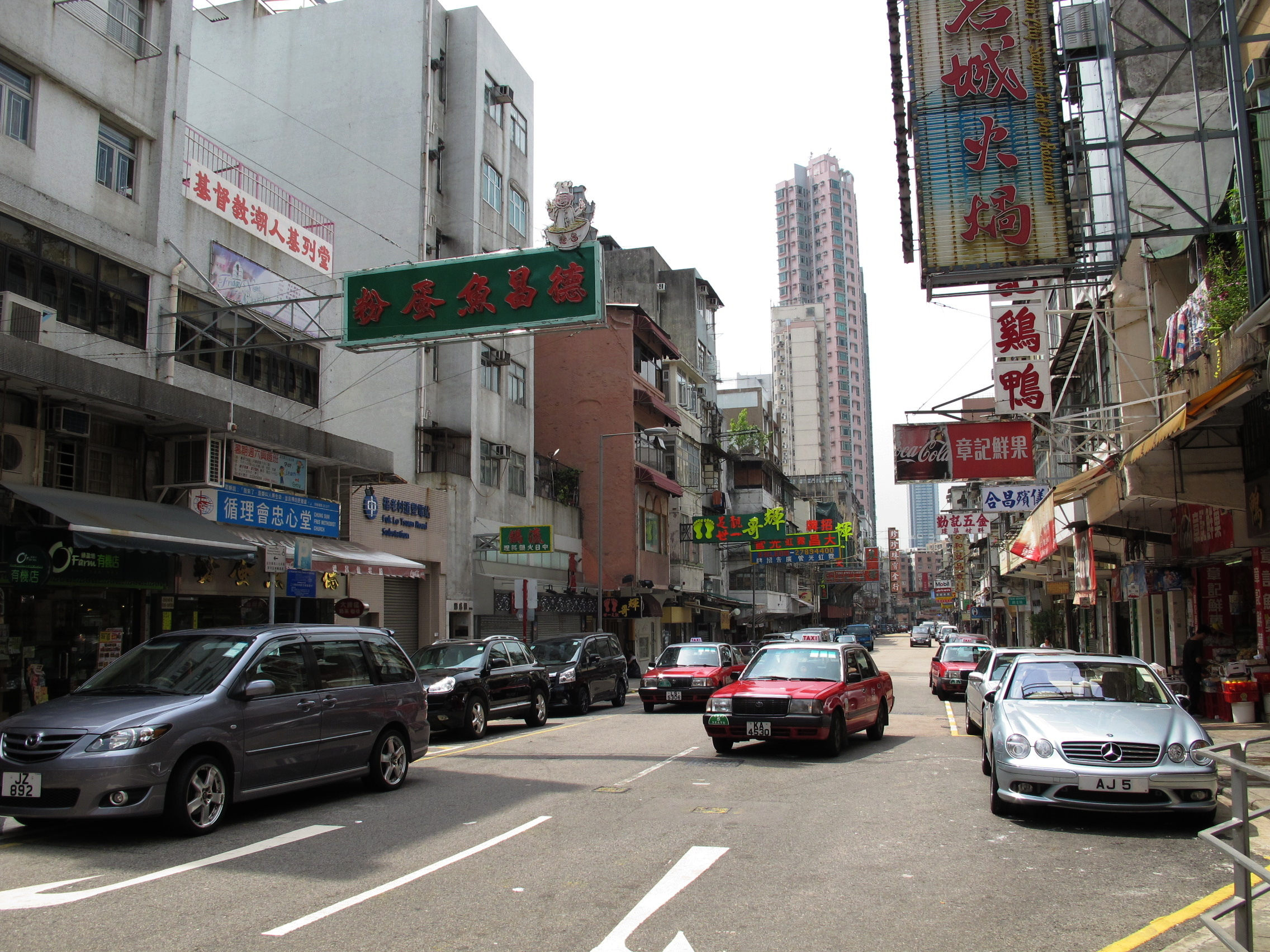 Fuk Lo Tsuen Road